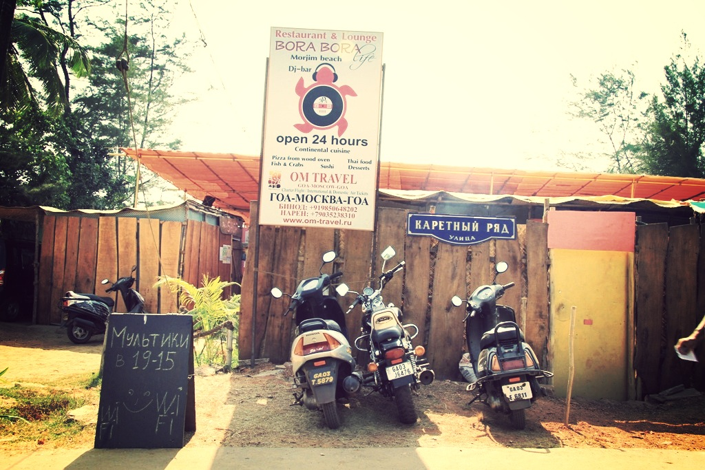 Ресторан «Бора-Бора» в деревне Морджим. У входа висит табличка «Каретный ряд» (именно на этой московской улице вырос хозяин заведения).